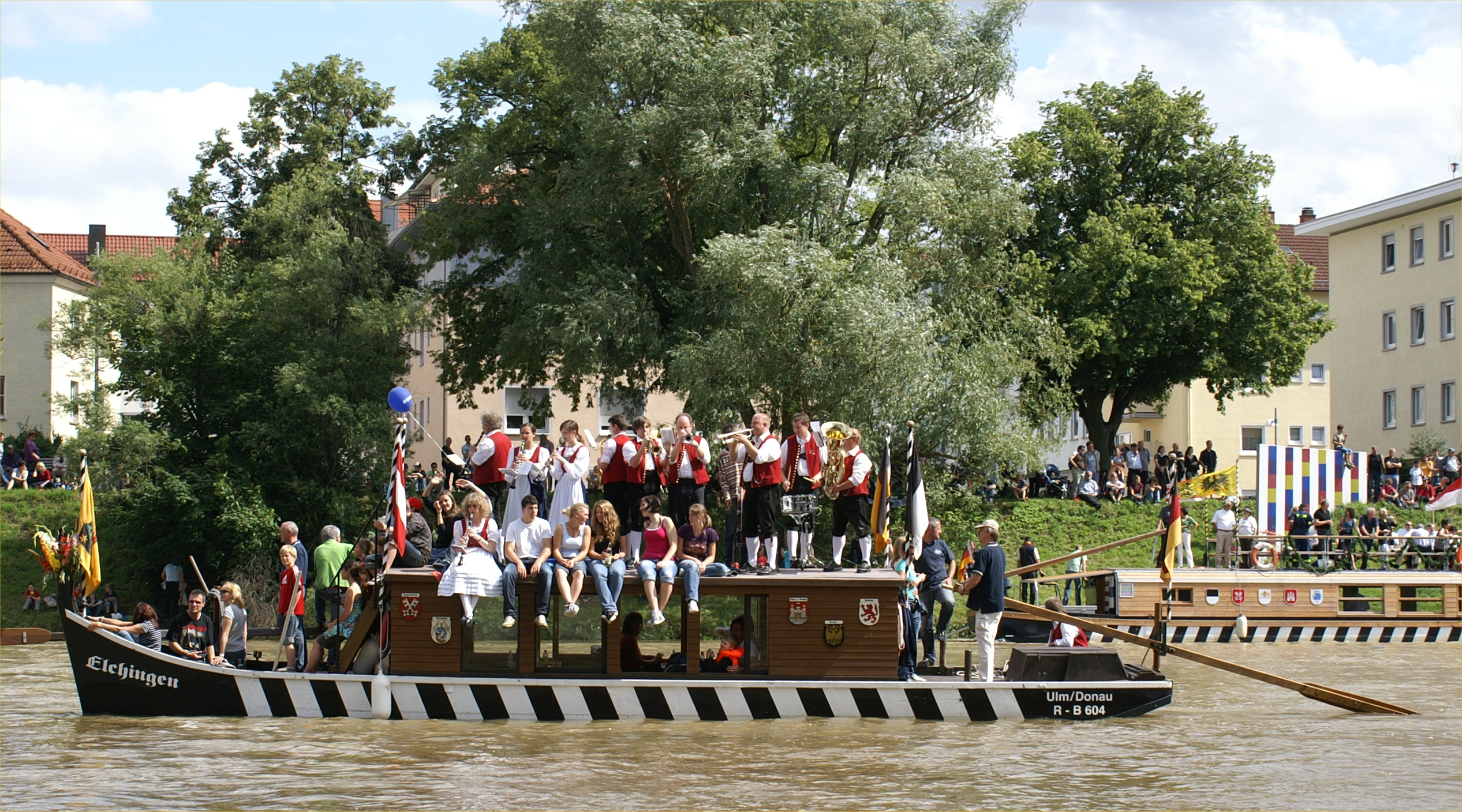 Mehrere Musikvereine machen beim Nabada in Ulm mit. Auf der kleinen Ulmer Schachtel "Elchingen" spielte 2009 der Musikverein Oberelchingen